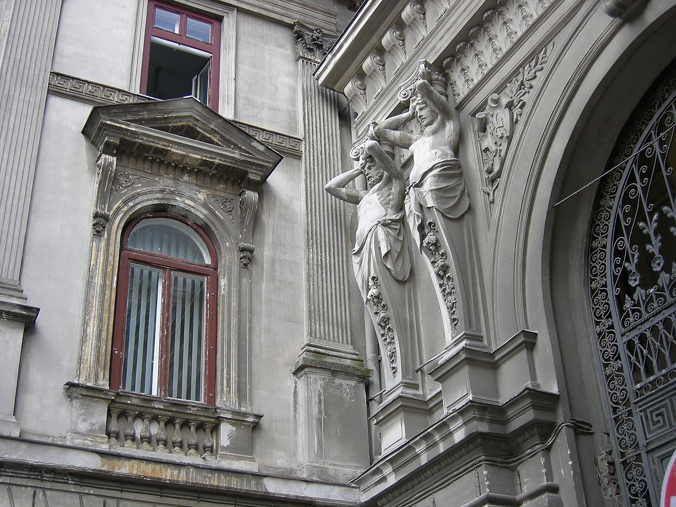 Pasajul Macca-Vilacrosse, Bucharest, Romania. Exterior, Str. E. Carada.